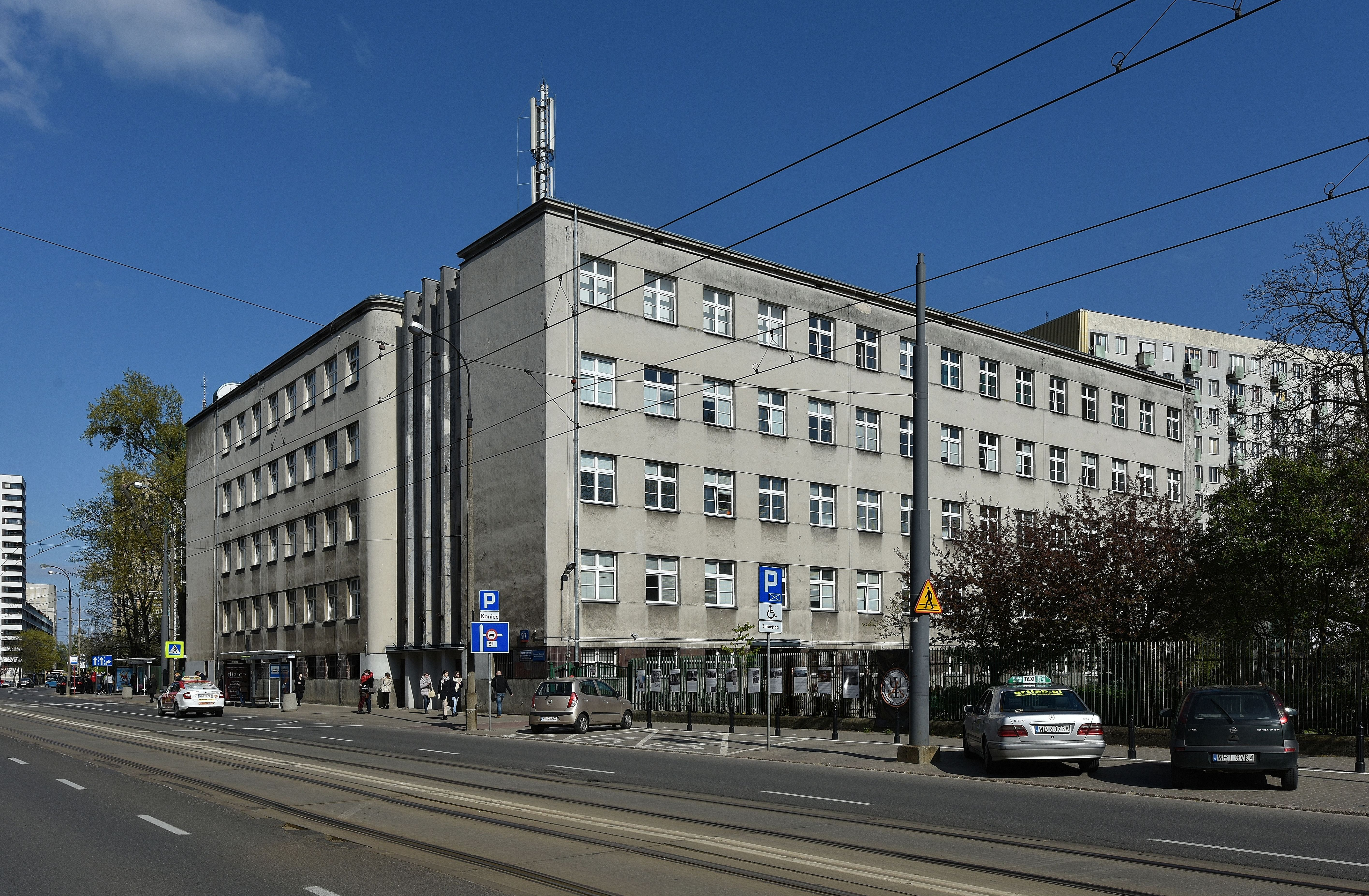 Siedziba Wydziału Psychologii Uniwersytetu Warszawskiego przy ul. Stawki 5/7 w Warszawie